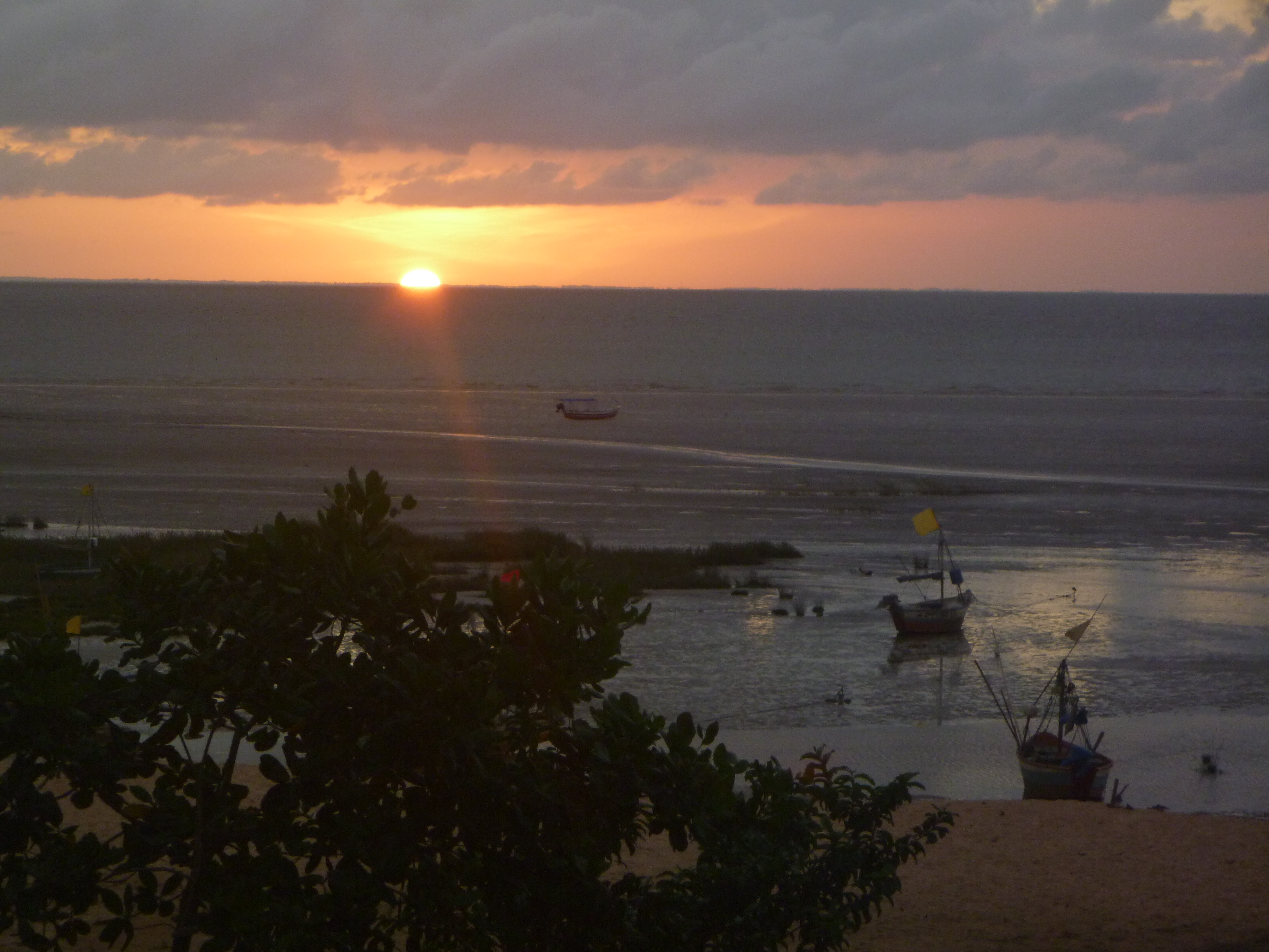 A melancolia do entardecer.